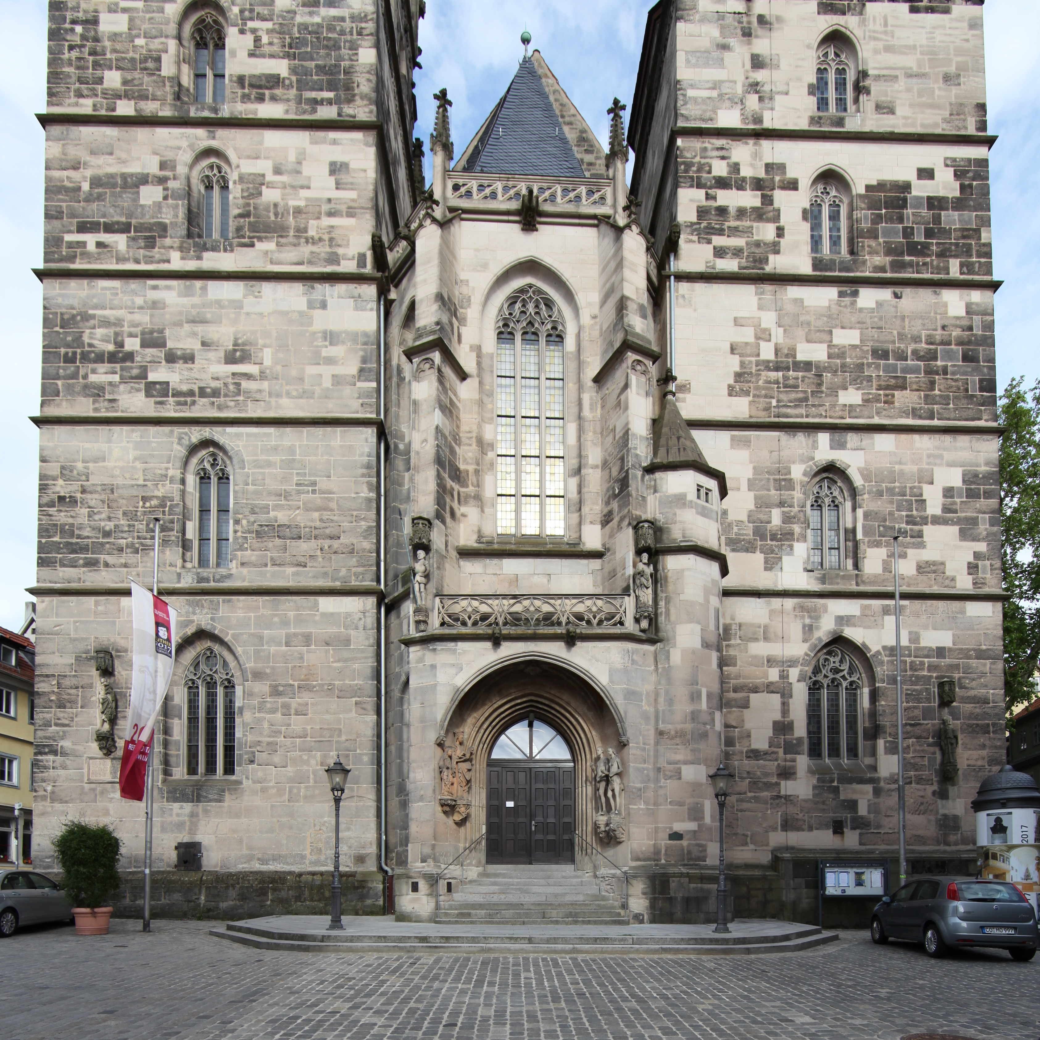 Westfassade Morizkirche Coburg